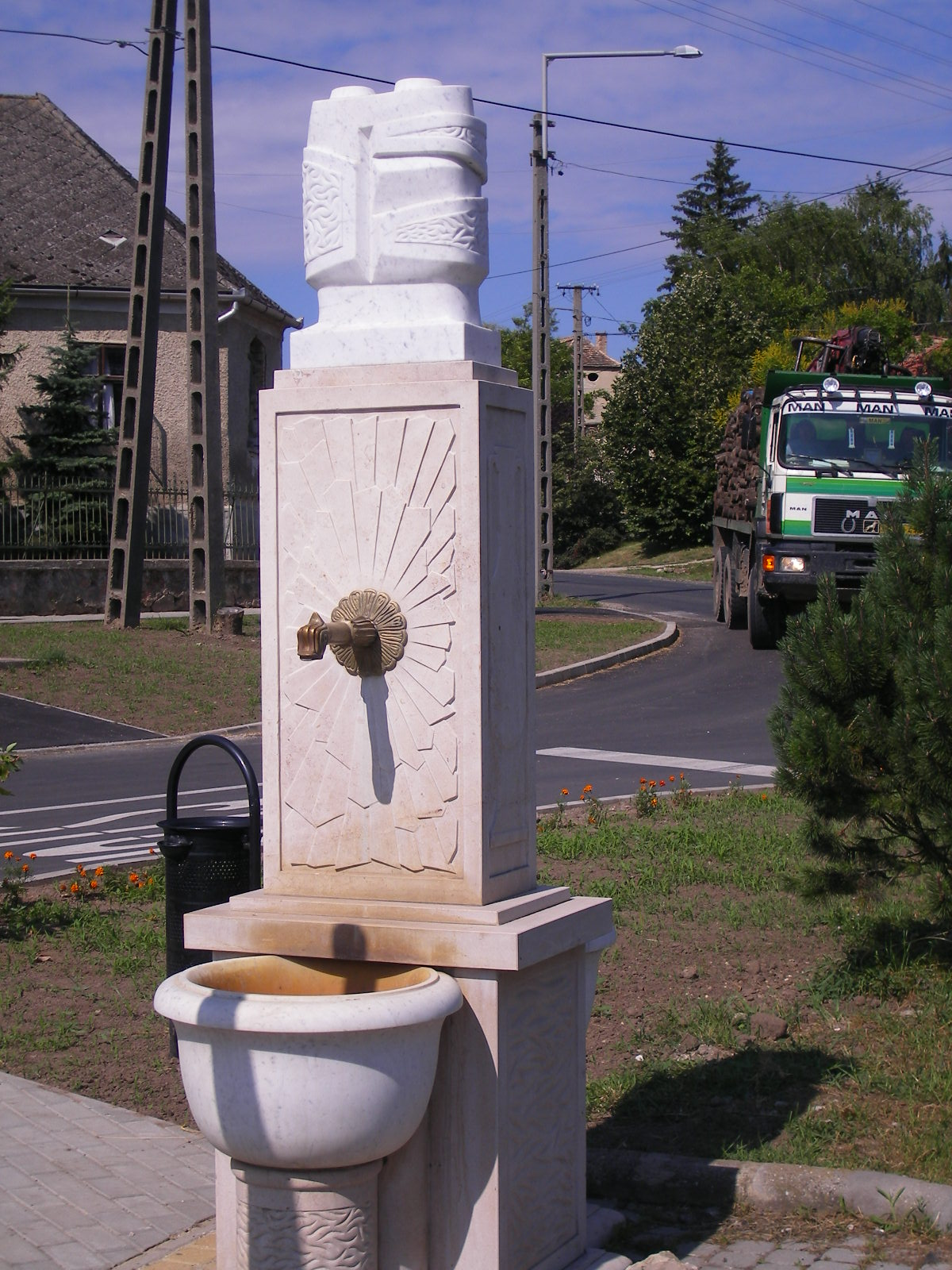 Kocs